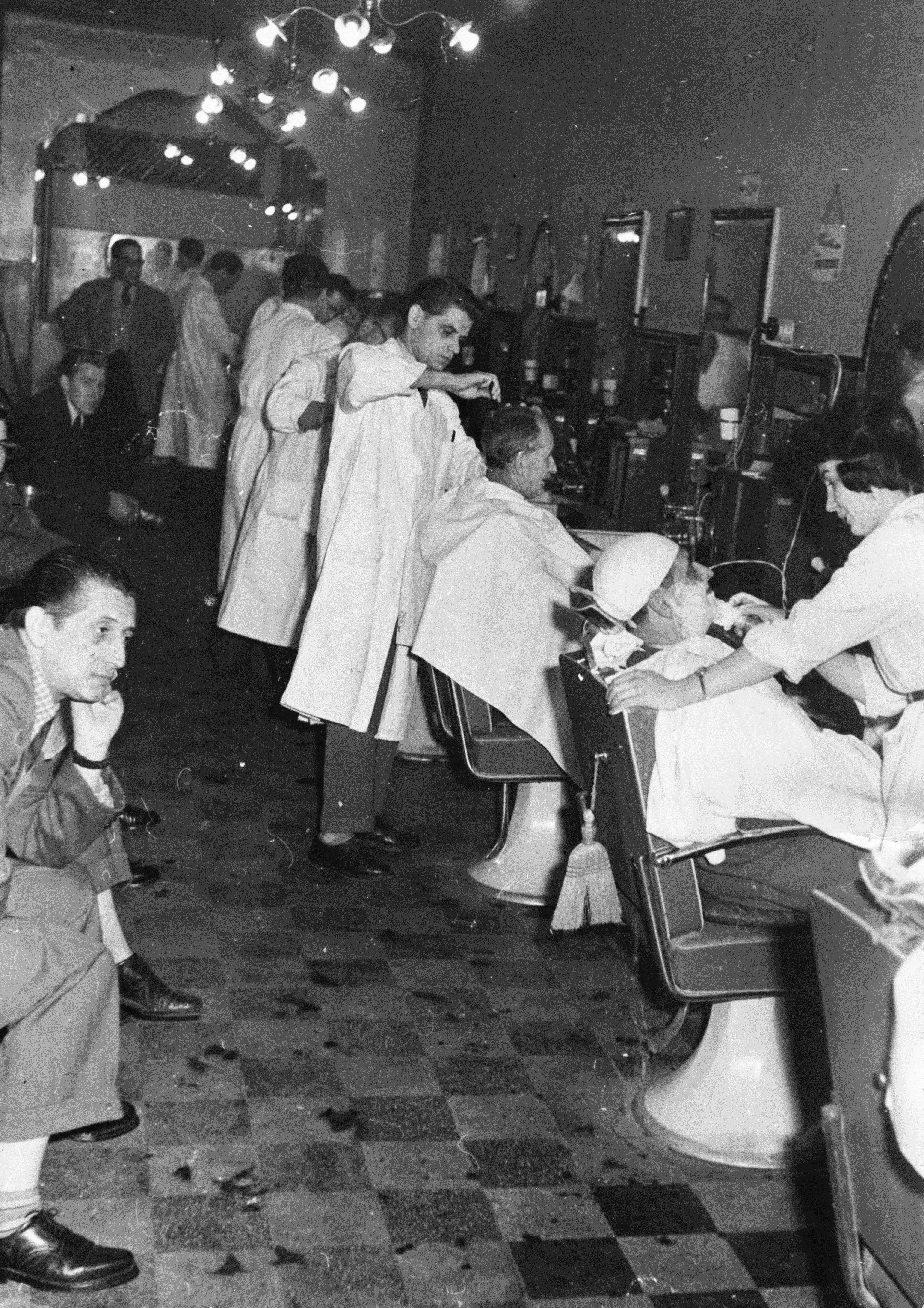 Tags: hairdresser, overall, shaving brush, broom, barber